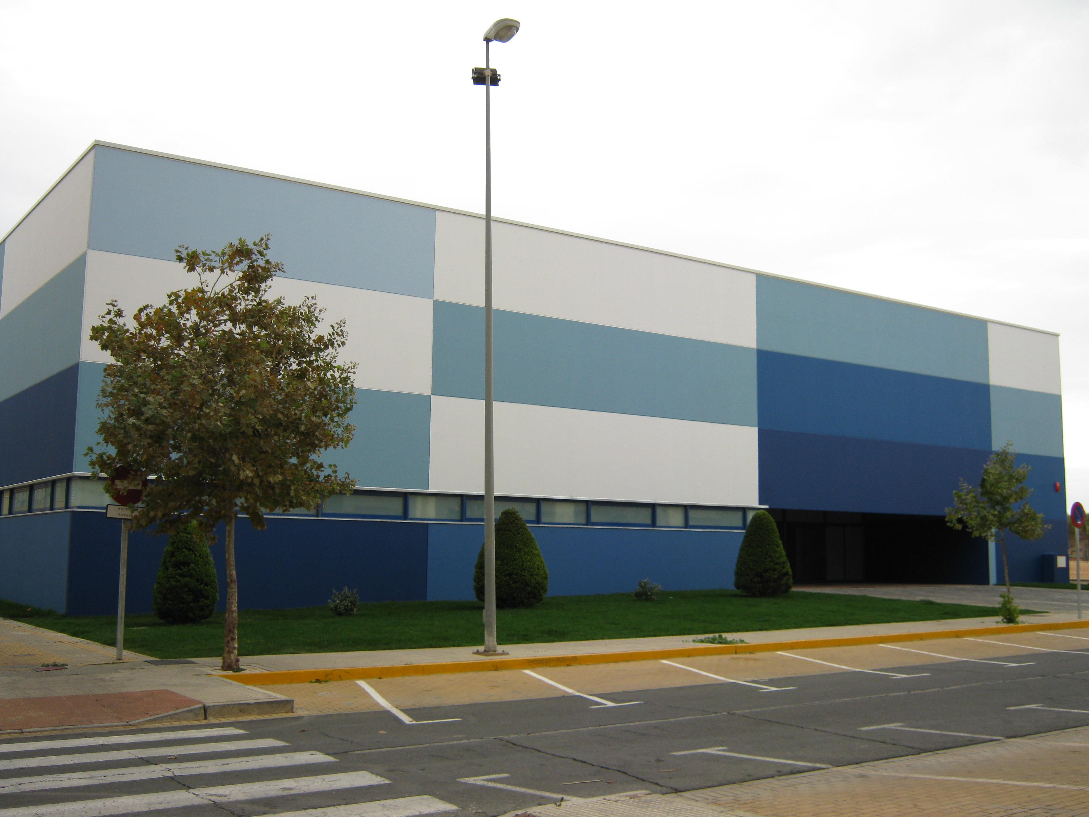 Centro de exposiciones y feria de muestras de Isla Cristina